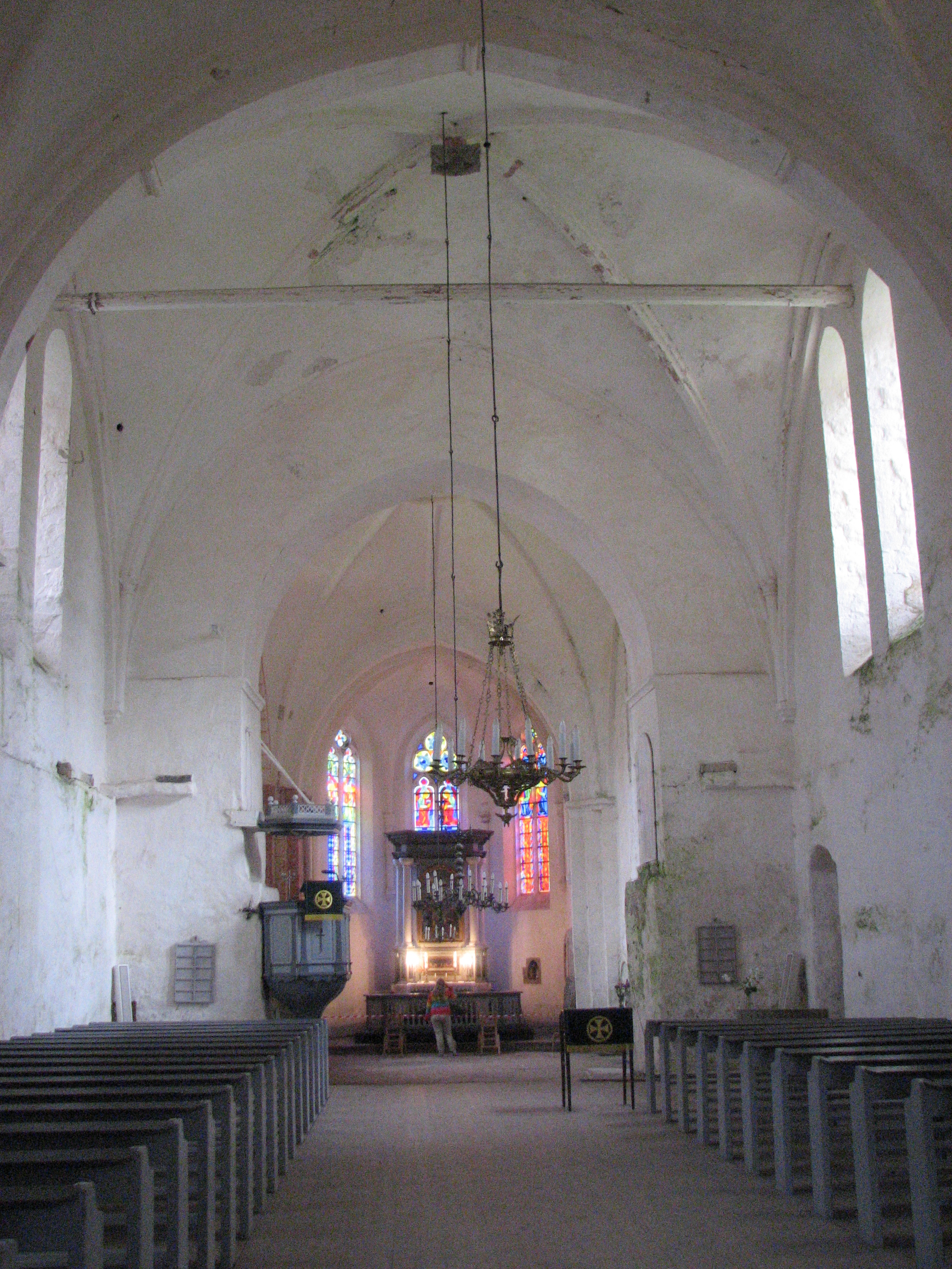 Valjala kiriku sisevaade altari poole